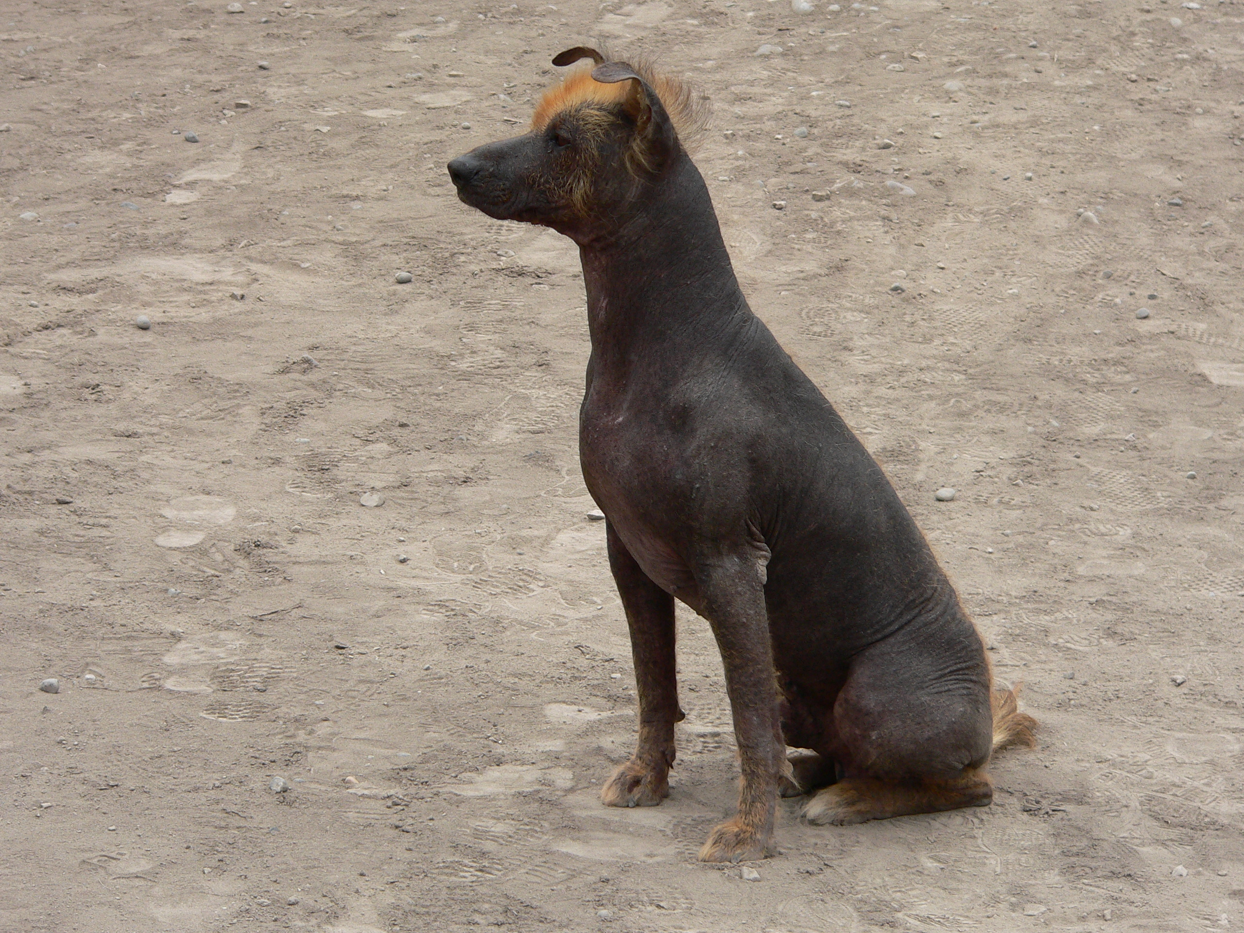 Descripción: Perro sin pelo del Perú Lugar: Huaca Pucllana Distrito : Miraflores Ciudad : Lima País : Perú Fotógrafo: © Manuel González Olaechea y Franco Fecha de la foto : 13 de julio de 2007